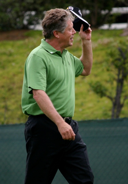 Michael Allen (golfer)